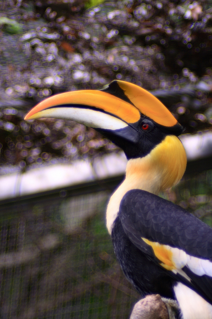 Buceros bicornis